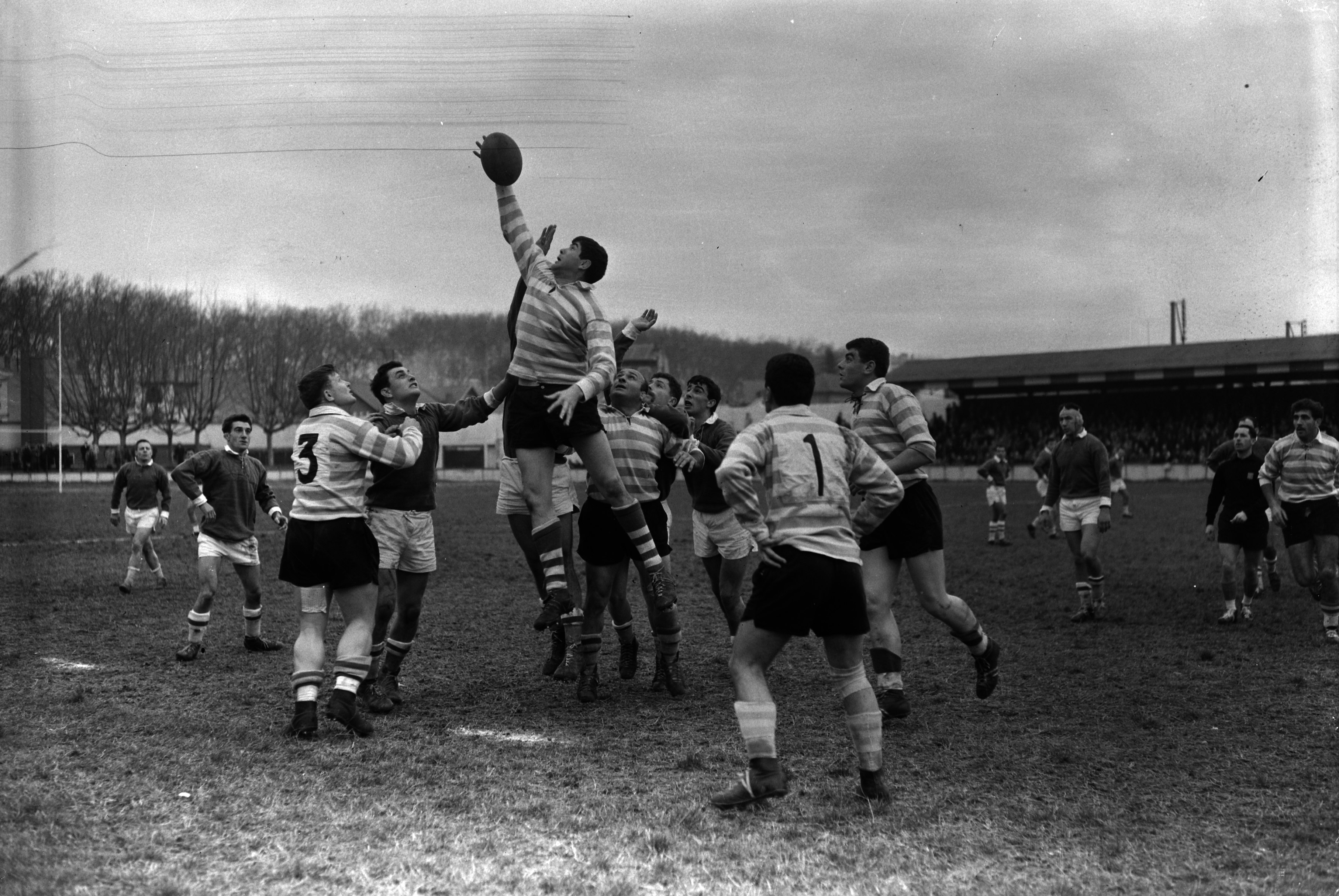 Stade du TOEC. Le 22 Janvier 1961. Vue du match entre le TOEC et Cahors.